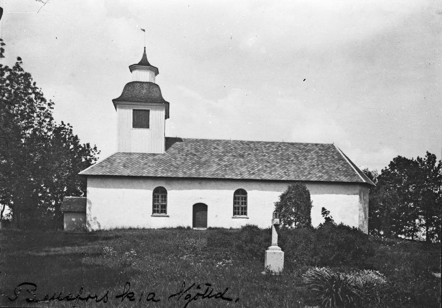 Kyrkan från söder. Kategori: (01) ExteriörerKyrkan från söder.